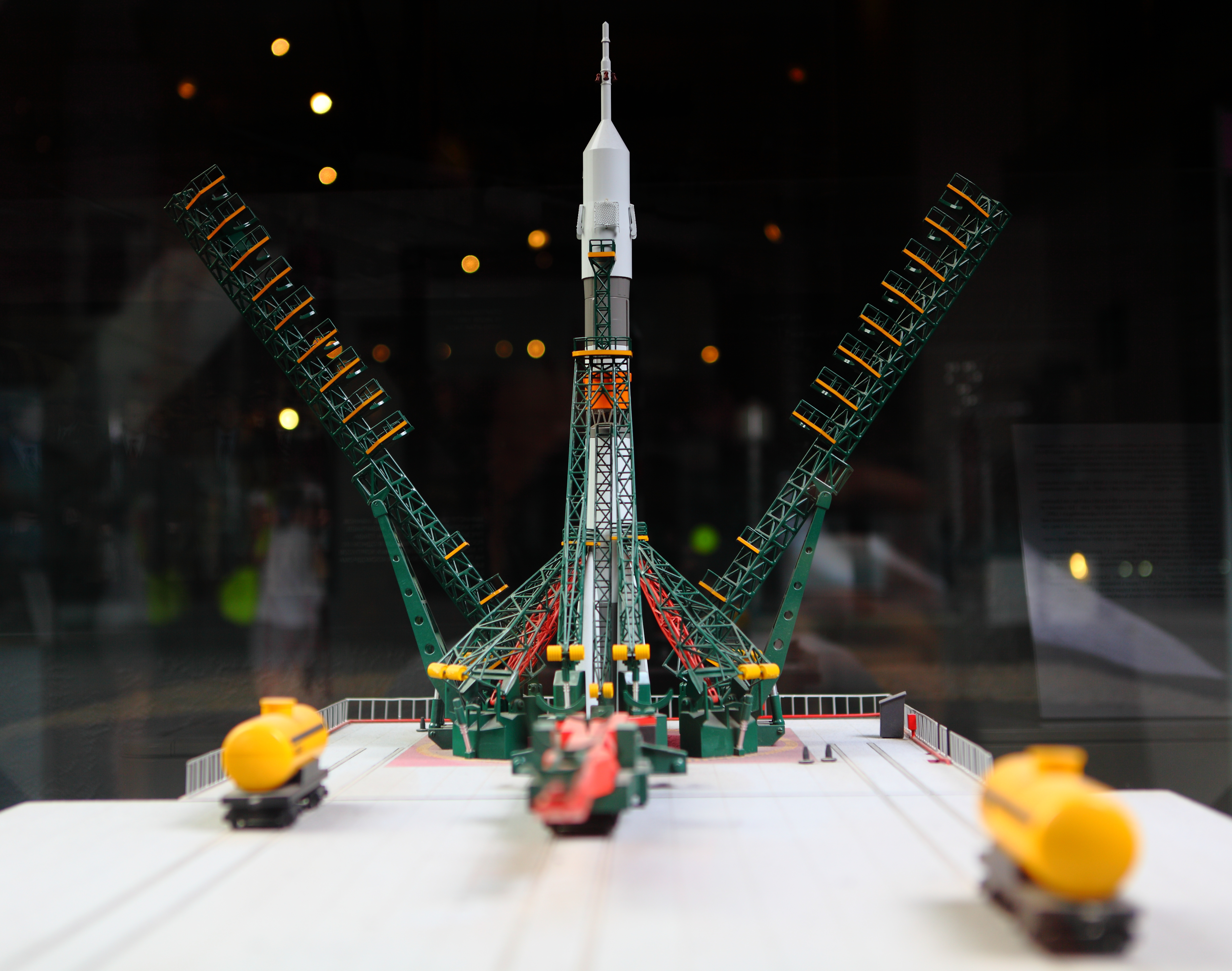 Стартовый комплекс космодрома Байконур с ракетой-носителем «Союз». Со стартового комплекса запускались ракеты-носители: «Спутник», «Молния», «Восток», «Восход», «Союз» и их модификации. Всего на космодроме Байконур имеется 9 стартовых комплексов с 15 пусковыми установками, 11 монтажно-испытательных корпусов, 3 станции для заправки ракет-носителей, кислородно-азотный завод, 92 узла связи, 2784 км линий связи, 470 км железнодорожных путей, 1281 км автодорог. Космодром Байконур расположен в Кзыл-ординской области Казахстана. Общая площадь 6717 км². В настоящее время арендуется Россией у Казахстана. Baikonur Cosmodrome is the world's first and largest operational space launch facility. It is located in the desert steppe of Kazakhstan, about 200 kilometres east of the Aral Sea, near Tyuratam railway station, at 90 meters above sea level. It is leased by the Kazakh government to Russia (until 2050) and is managed jointly by the Russian Federal Space Agency and the Russian Aerospace Defence Forces. Both Vostok 1, the first manned spacecraft in human history, and before it Sputnik 1, the world's first orbital spaceflight of any sort, were launched from one of Baikonur's launch pads, which is now known as Gagarin's Start, named after Yuri Gagarin. Collection of the Museum of Astronautics, Moscow